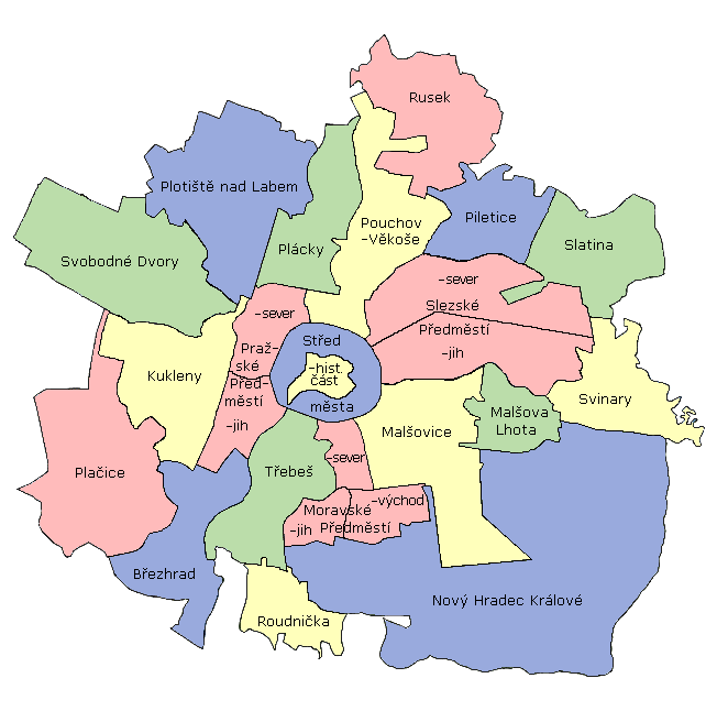 Hranice komisí místní samosprávy v Hradci Králové